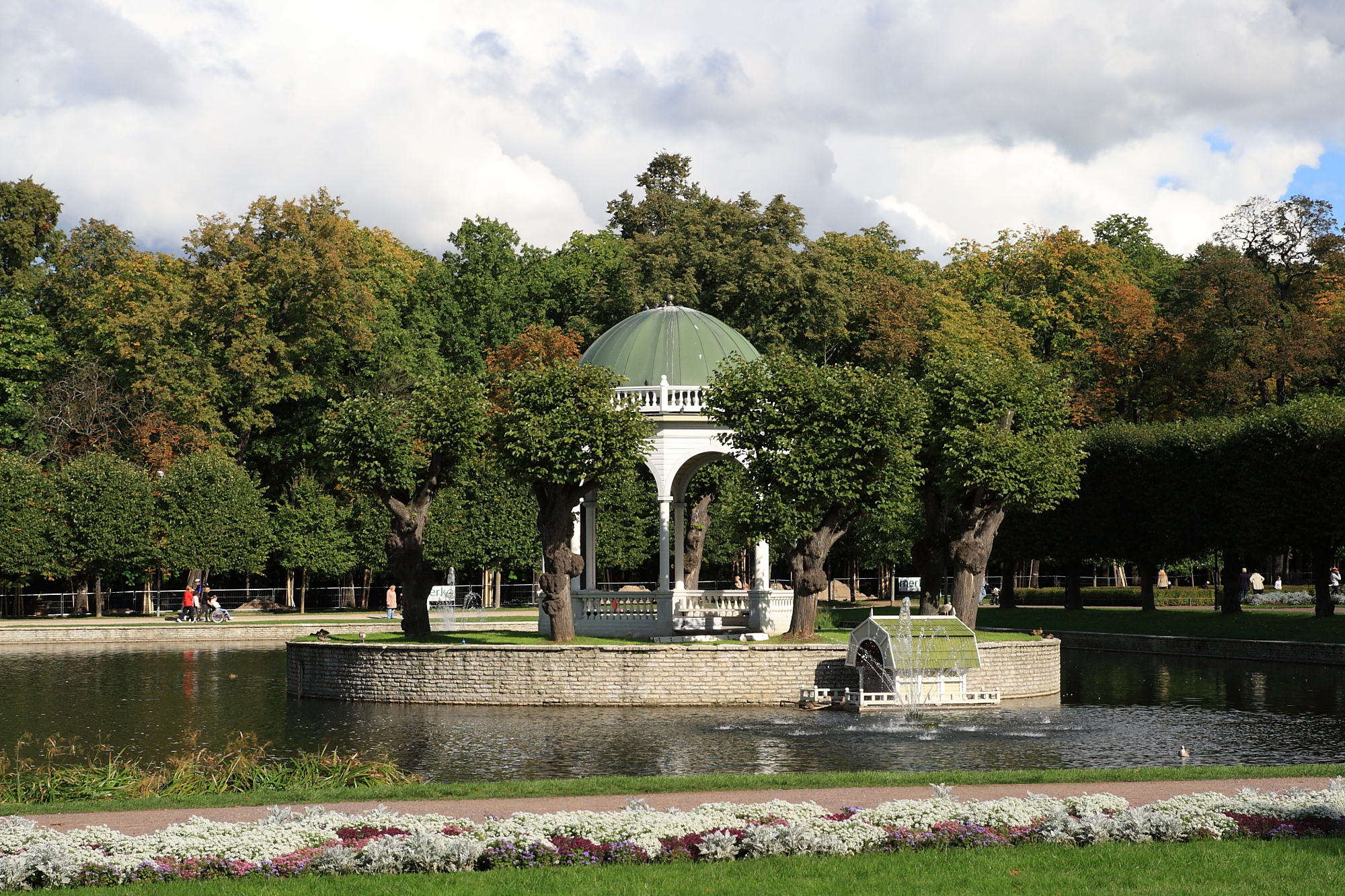 Luigetiik